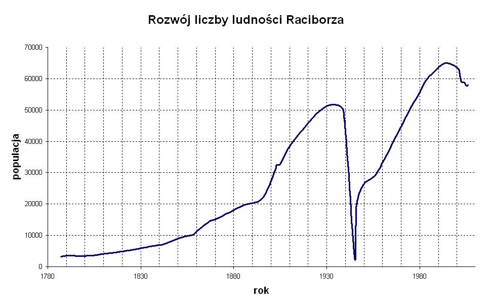 Rozwój liczby ludności Raciborza od 1787.